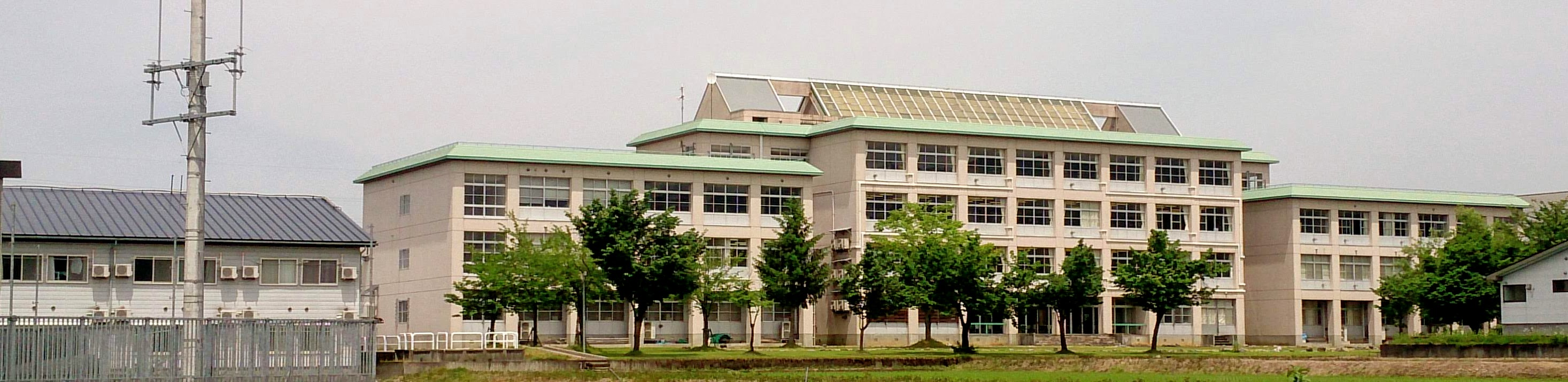 新潟県立国際情報高校・校舎